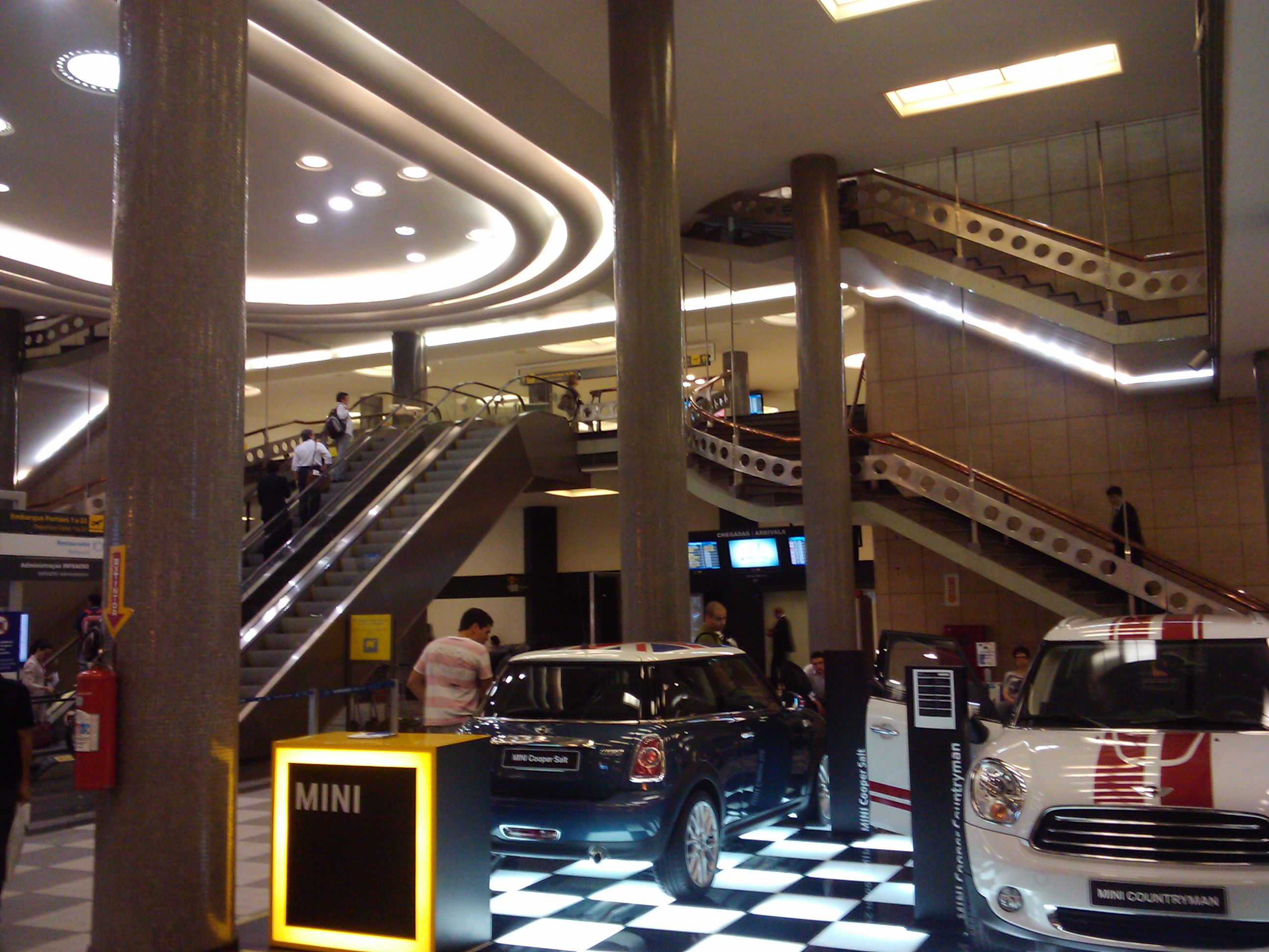 Sao Paulo - SP